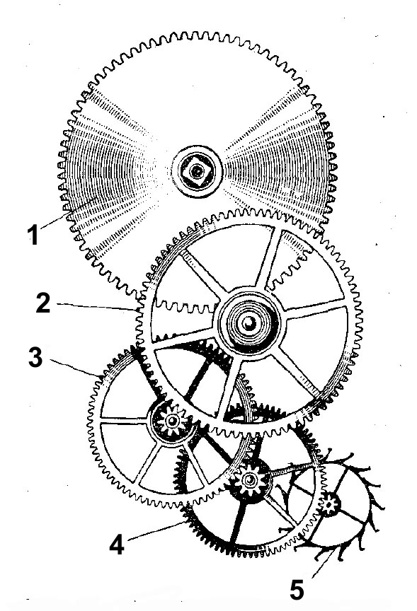 Gehwerk.